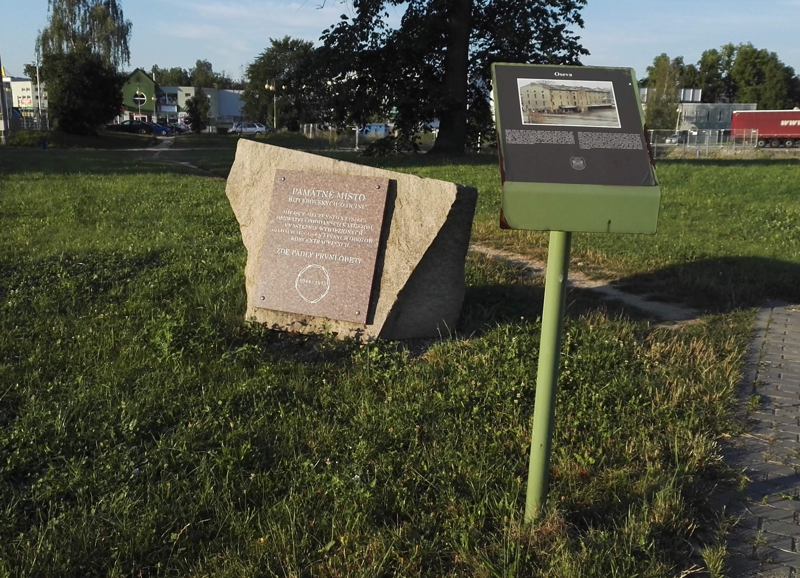 Český Těšín. Pamětní deska obětem nacismu z roku 1969. Deska se původně nacházela na budově Kohnovy továrny na ohýbaný nábytek (pozdější Oseva), kde byli před vyvezením do koncentračních táborů internováni vězni zatčení v rámci operace Aussenordentliche Befriedungsaction. Po demolici budovy továrny byla deska přenesena na současné místo.